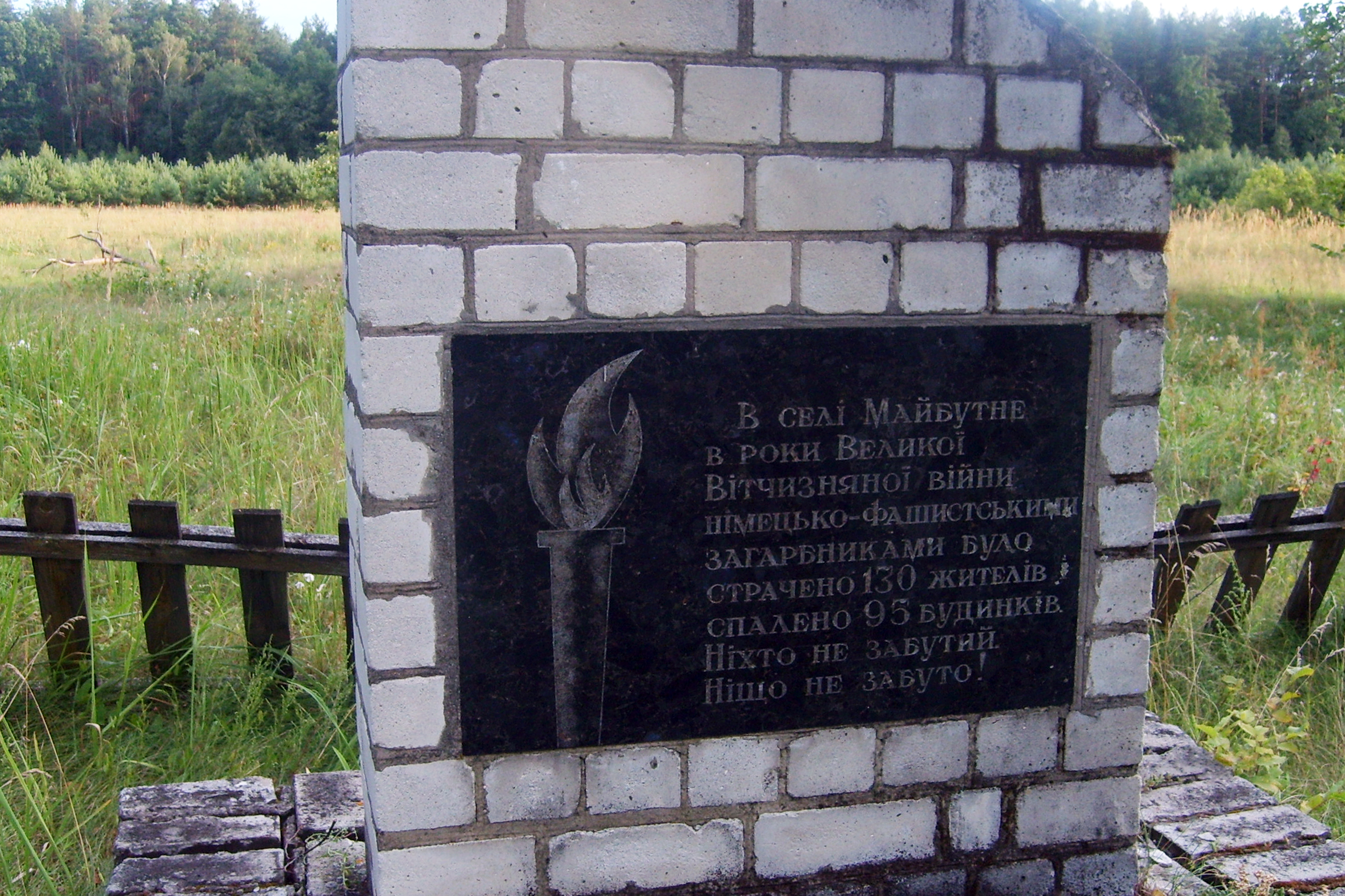 Памятная доска в селе Майбутне